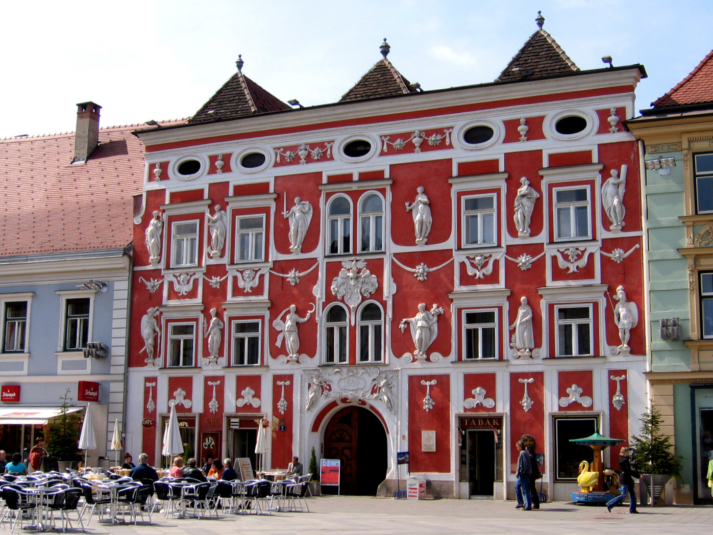 Hacklhaus Leoben